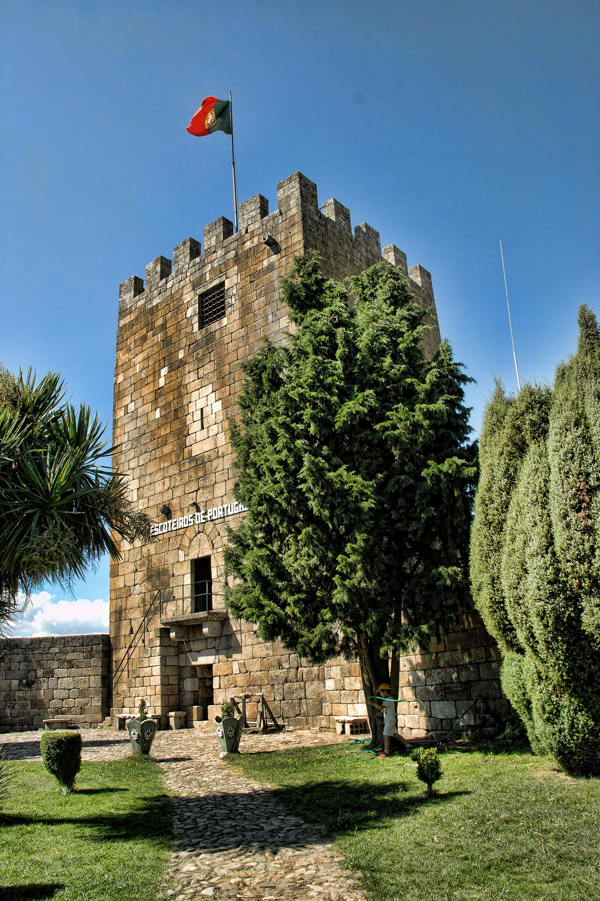 Lamego - Castelo de Lamego This file was uploaded for Wiki Loves Monuments in Portugal with the unique identifier 70699.